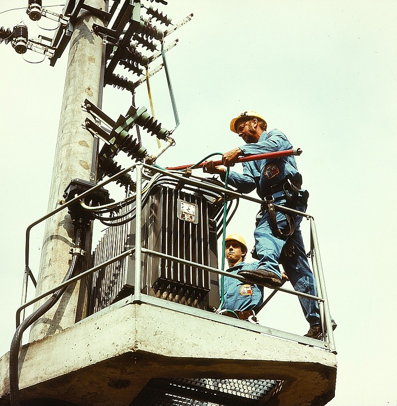 Original image description from the Deutsche Fotothek Elektromonteur